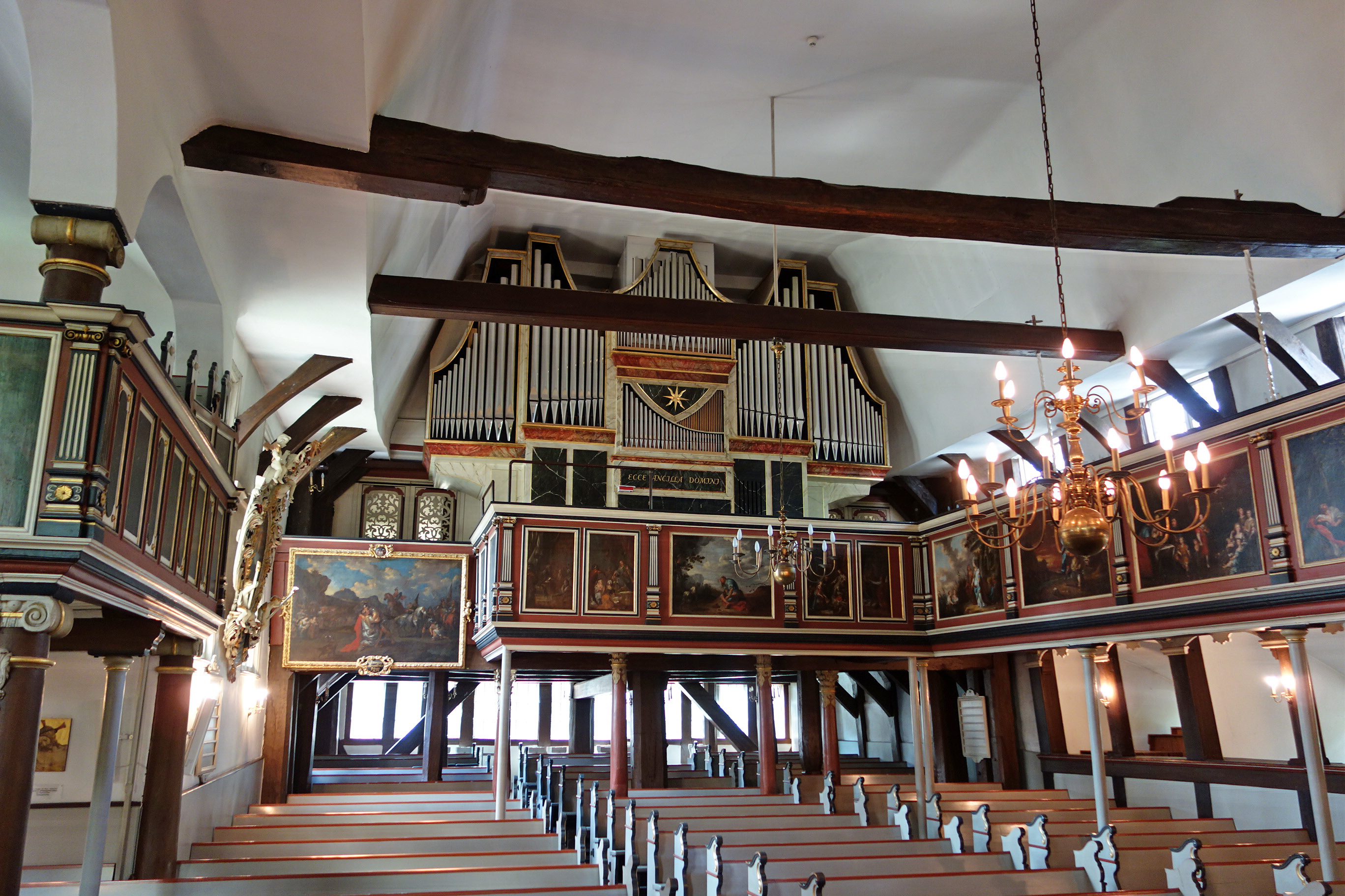 Orgel in Hamburg-Bergedorf